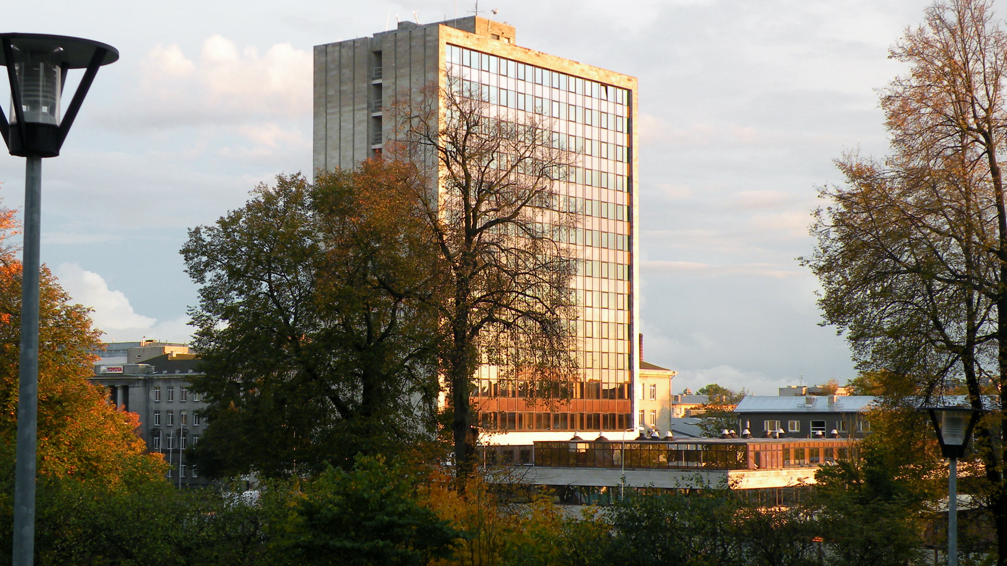 Rahandusministeeriumi peahoone